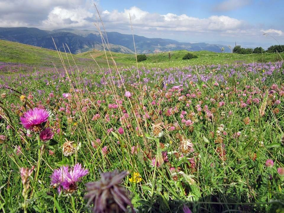 پوشش گياهي مراتع درجه يك آرپاچوخوري روستاي خان كندي گرمي